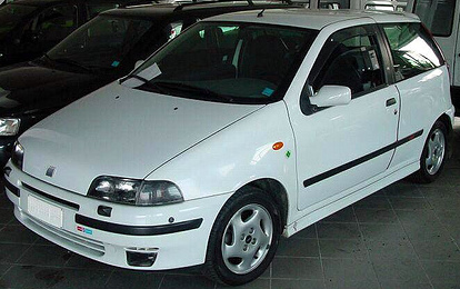 La mia Punto Gt al concessionaria